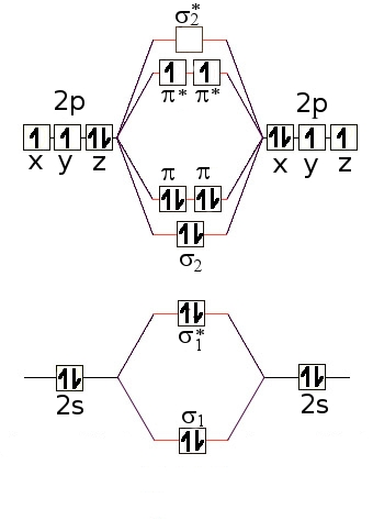 Rappresentazione degli orbitali molecolari dell'ossigeno